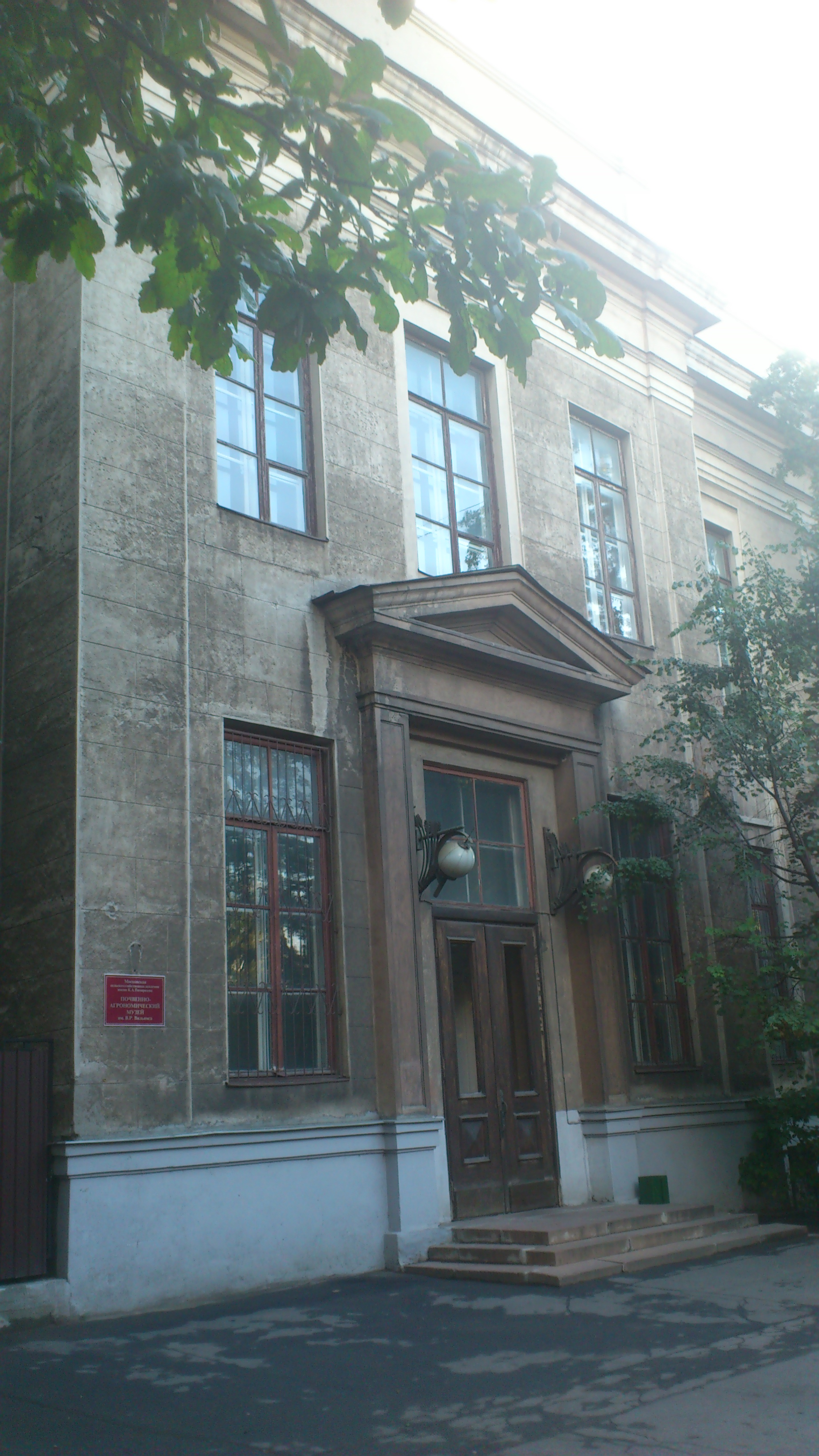 Почвенно-агрономический музей им. В. Р. Вильямса. Москва, Тимирязевская ул., 55.